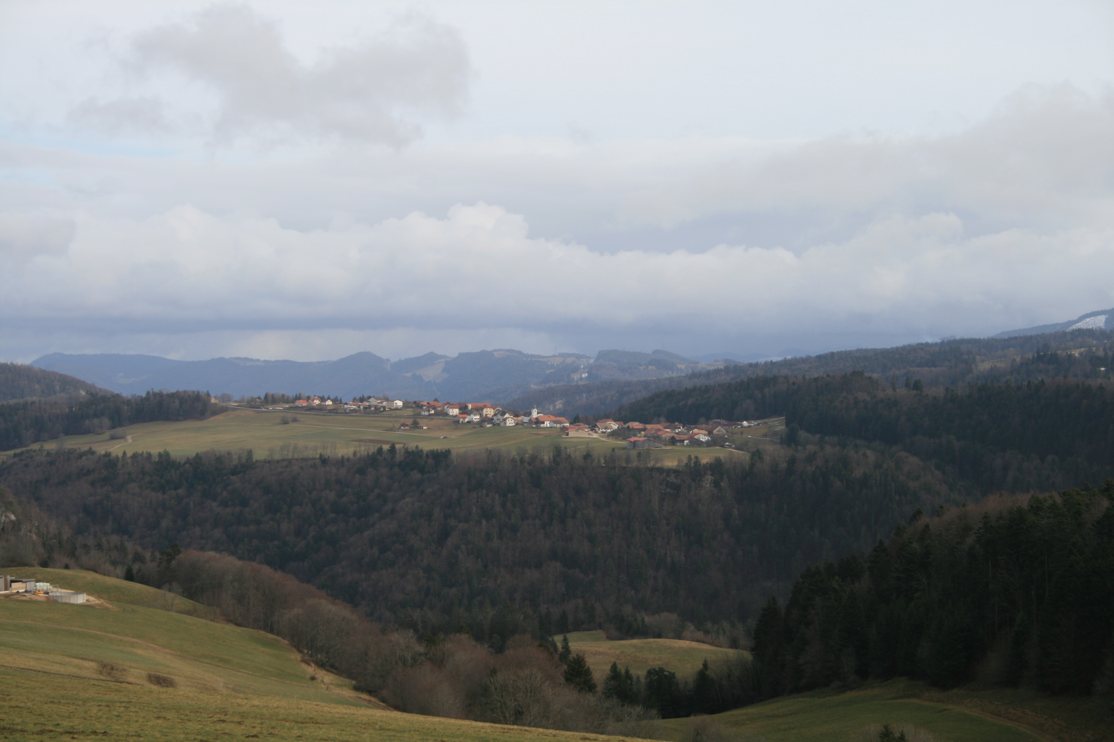 Blick auf Saulcy (von Saint-Brais)